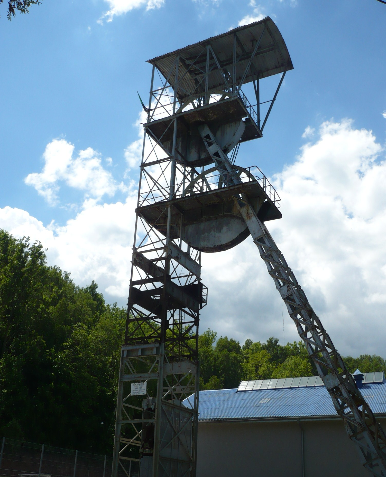 Nowa Ruda, szyb „Lech""